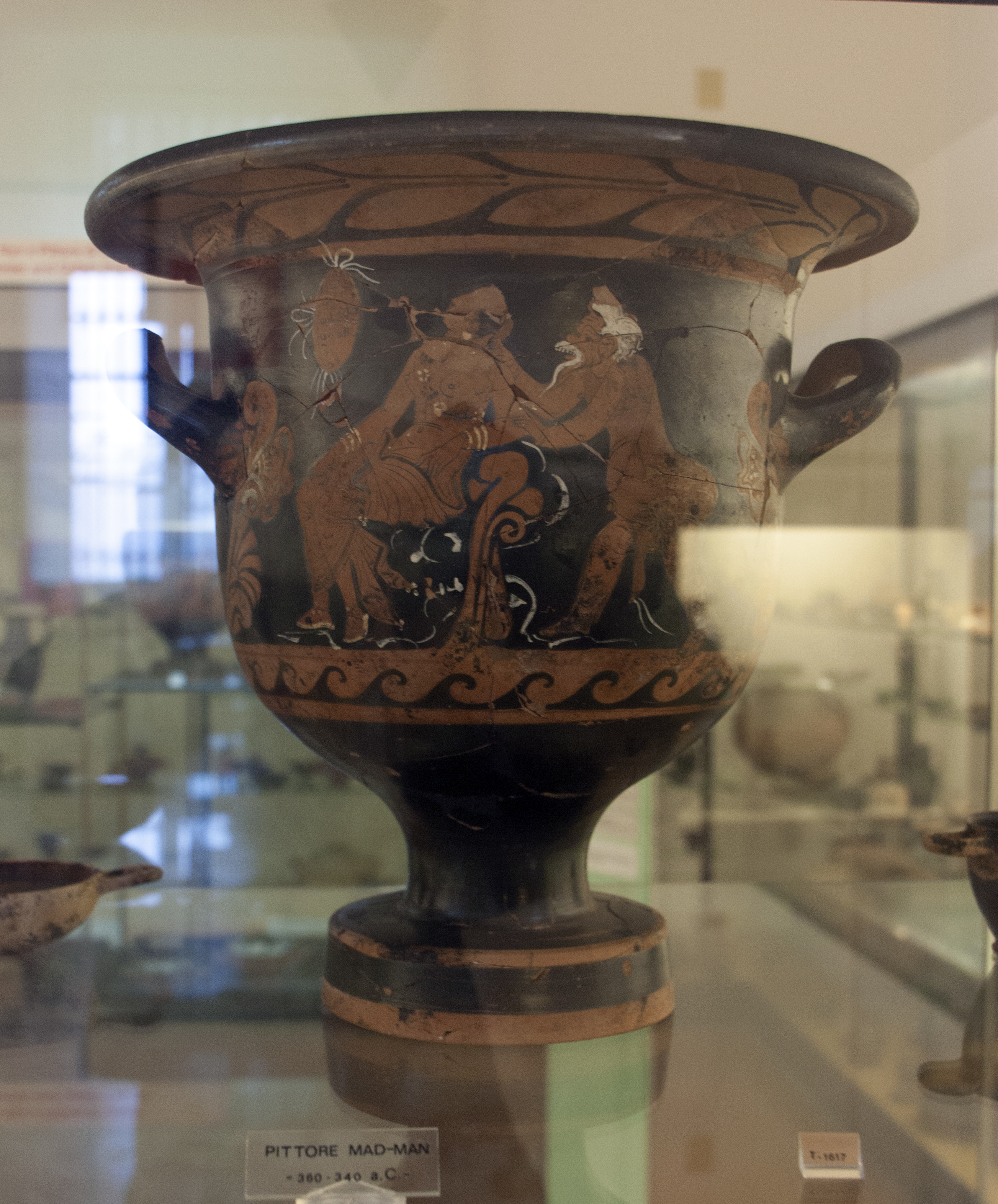 360-340 a.C